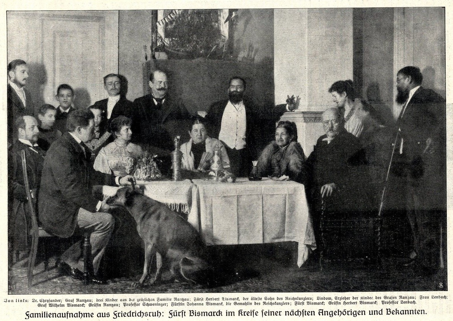 Familie Bismarck mit Gästen in Schloss Friedrichsruh, darunter Graf Kuno zu Rantzau und Marie (geb. Bismarck), Wilhelm von Bismarck, Herbert von Bismarck